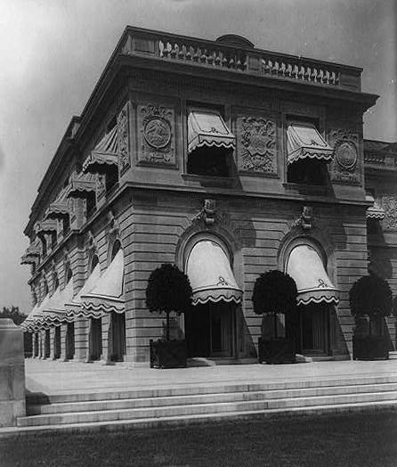 Miramar (mansion)